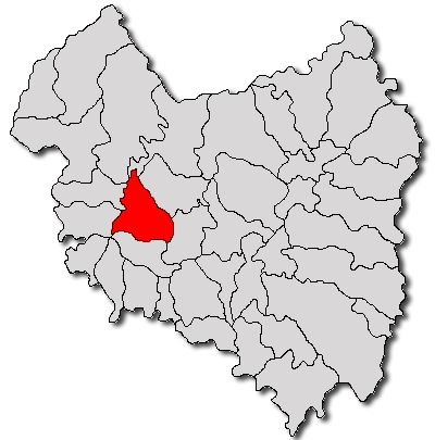 Categorie:Hărţi ale judeţului Covasna